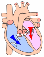 Bihotzeko odol-fluxuak diastole-prozesuan.